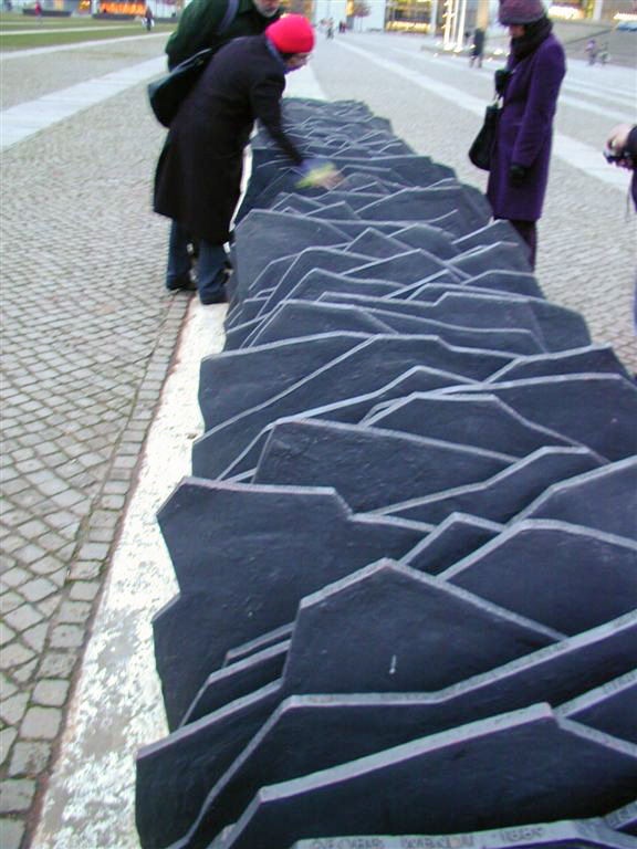 Denkmal Reichstag, Erinnerung an ermordete Reichstagsabgeordnete aus KPD, SPD, Zentrum etc.